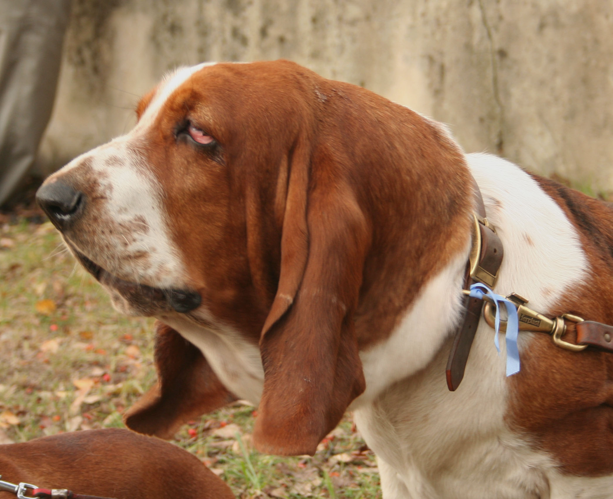 Basset hound na krajowej wystawie w Rybniku - Kamieniu